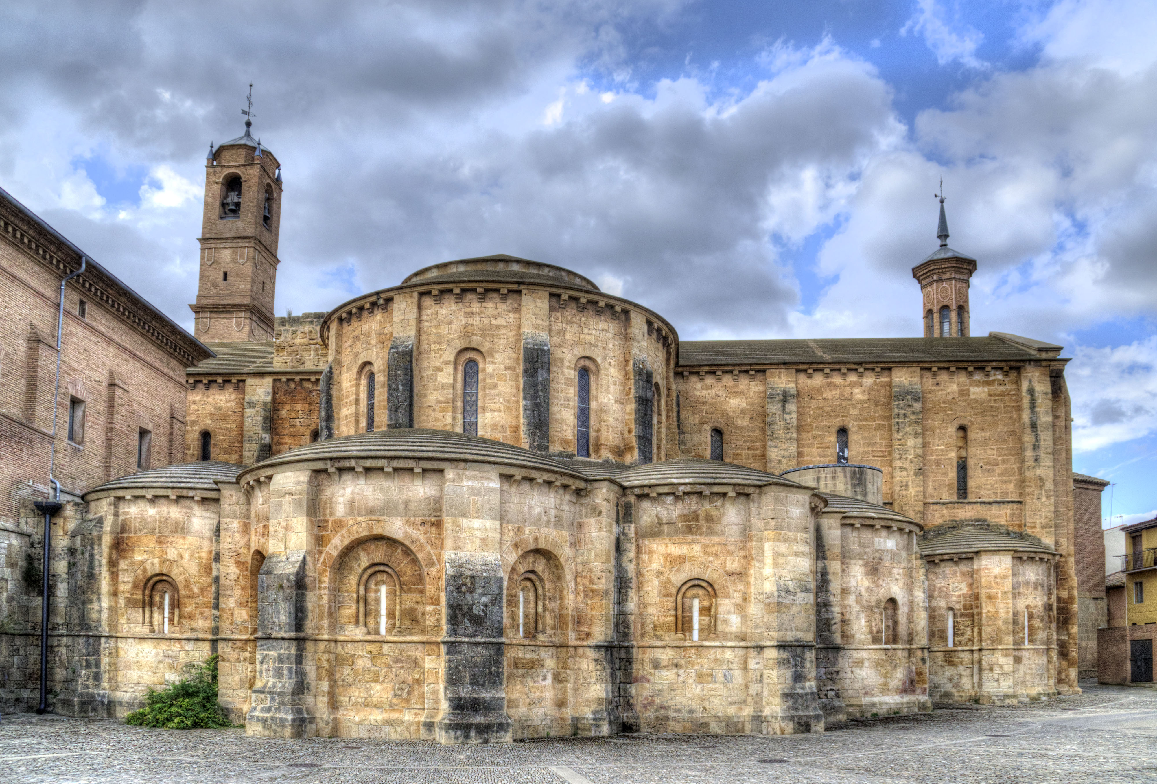 El monasterio cisterciense de Santa María la Real,​ también llamado Santa María de Nienzebas,​ está en Fitero, Navarra. Con origen en el siglo XII, actualmente se encuentra adosado a edificaciones que impiden verlo en su totalidad en el exterior.